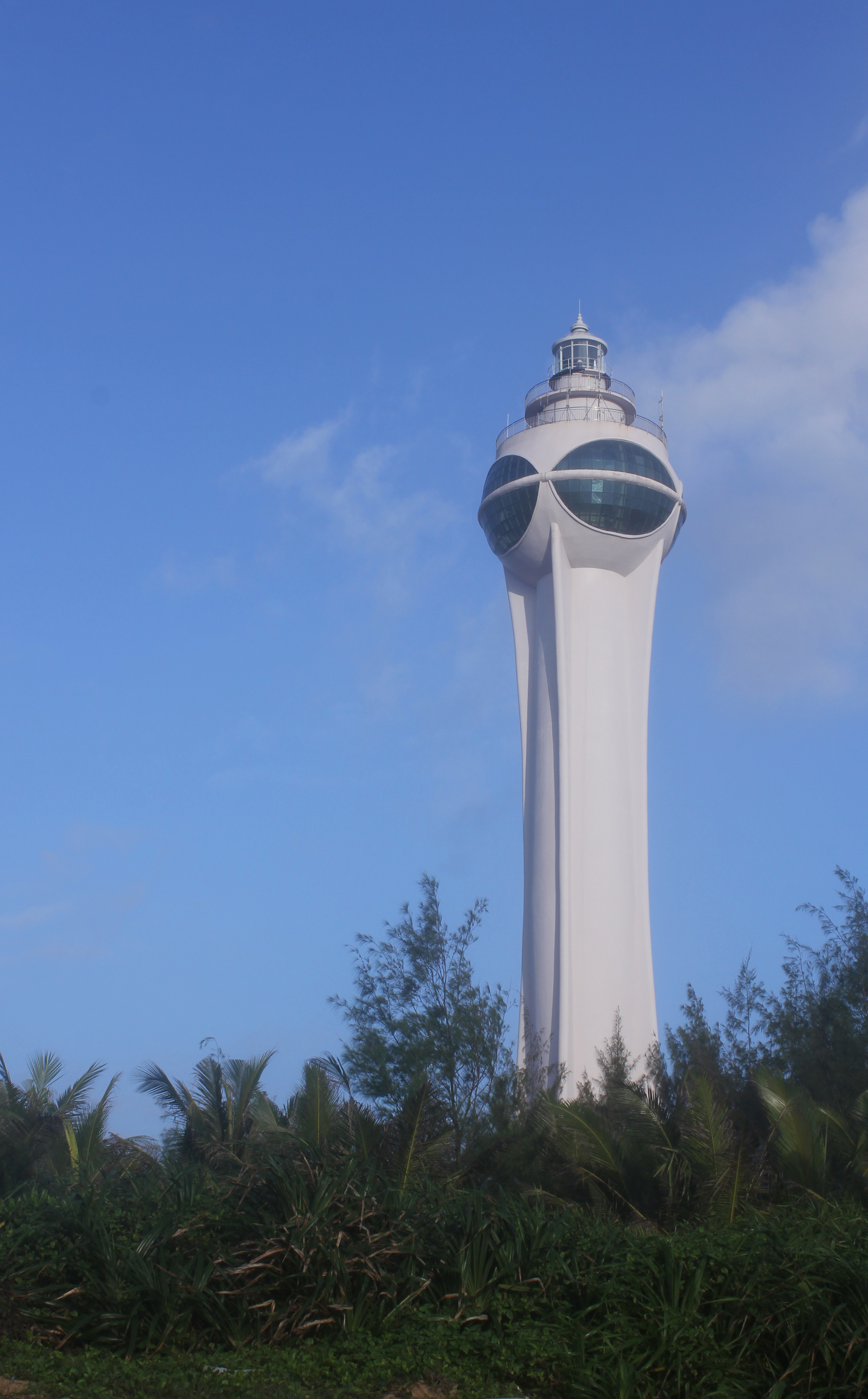 中国海南省博鳌灯塔